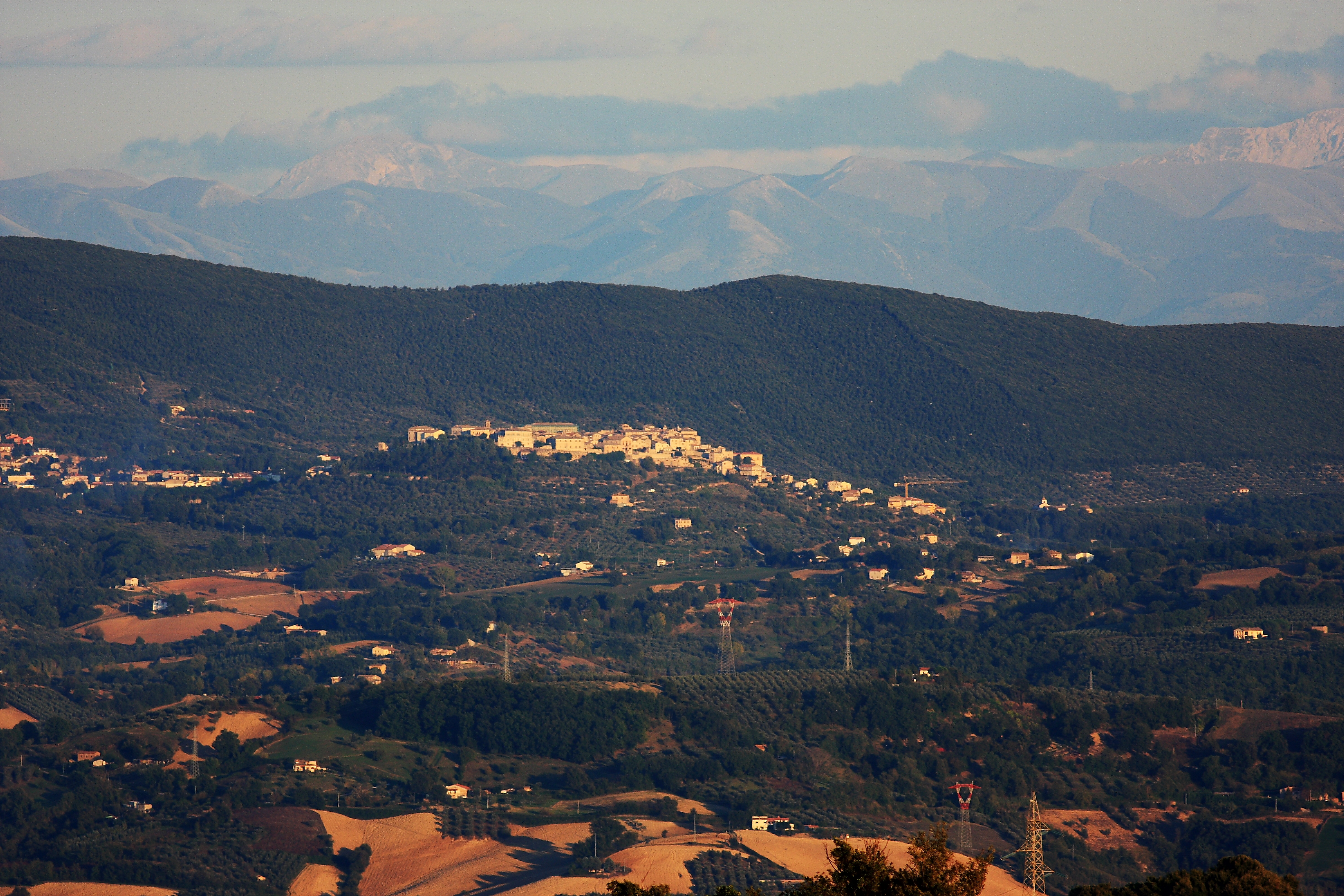 Panorama di Lugnano in Teverina da Castel Cellesi (VT)